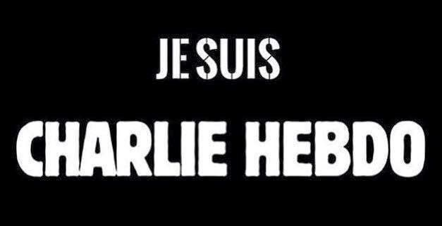 Je suis Charlie Hebdo.